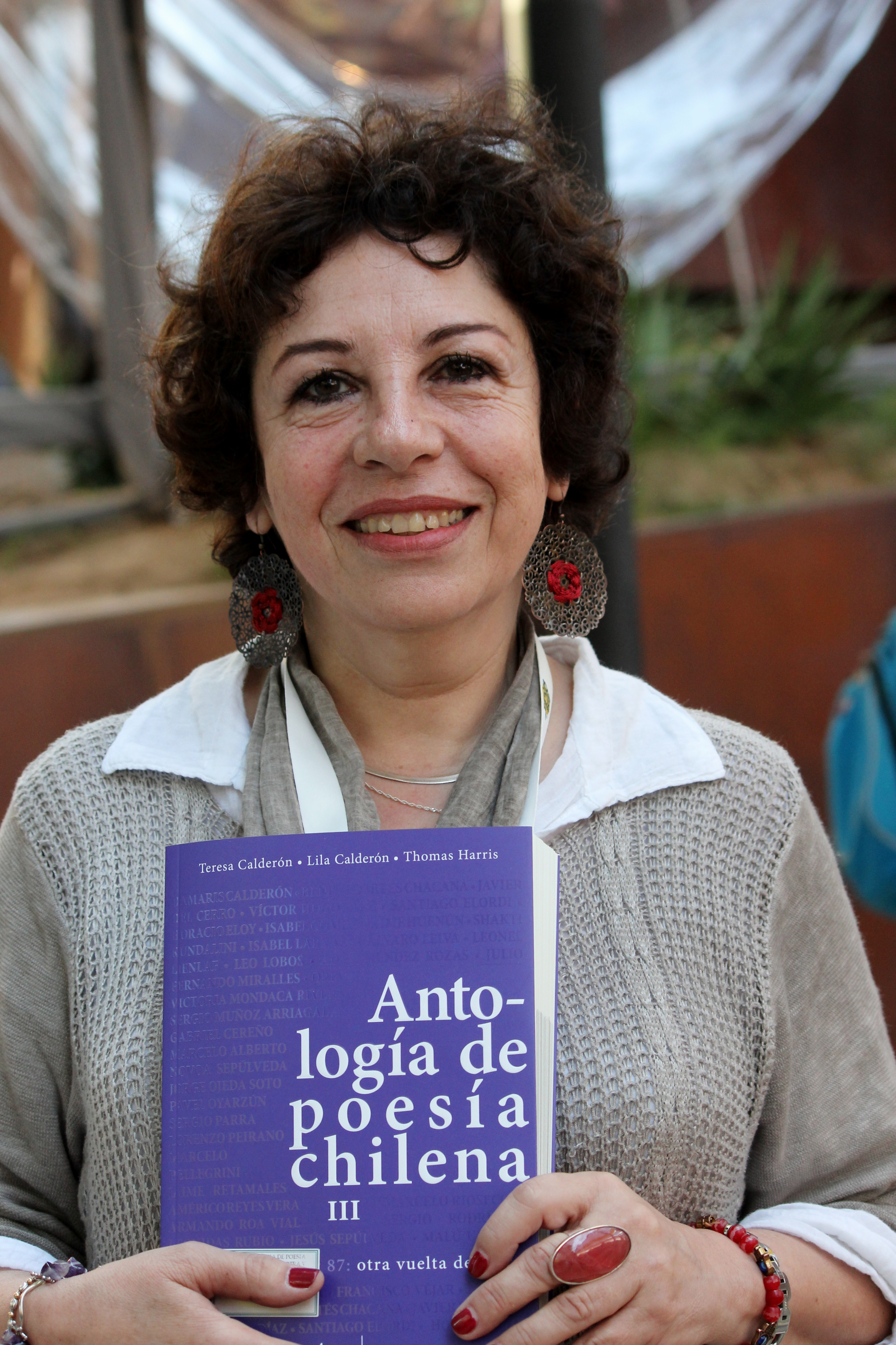 La escritora chilena Teresa Calderón en la segunda etapa del Festival de Autores de Santiago 2018 realizada en el GAM.